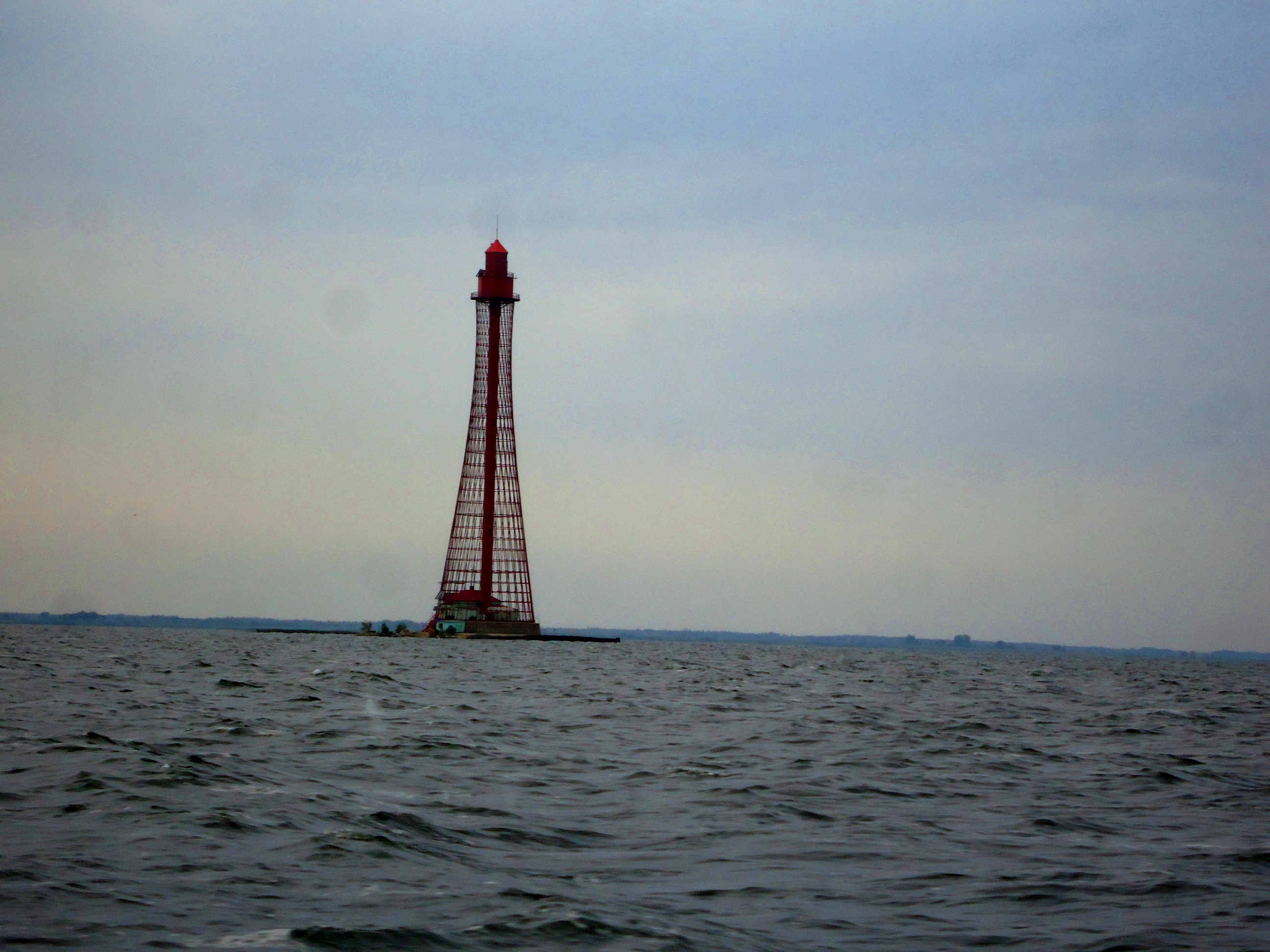 Станіслав-Аджигольські маяки, с. Рибальче